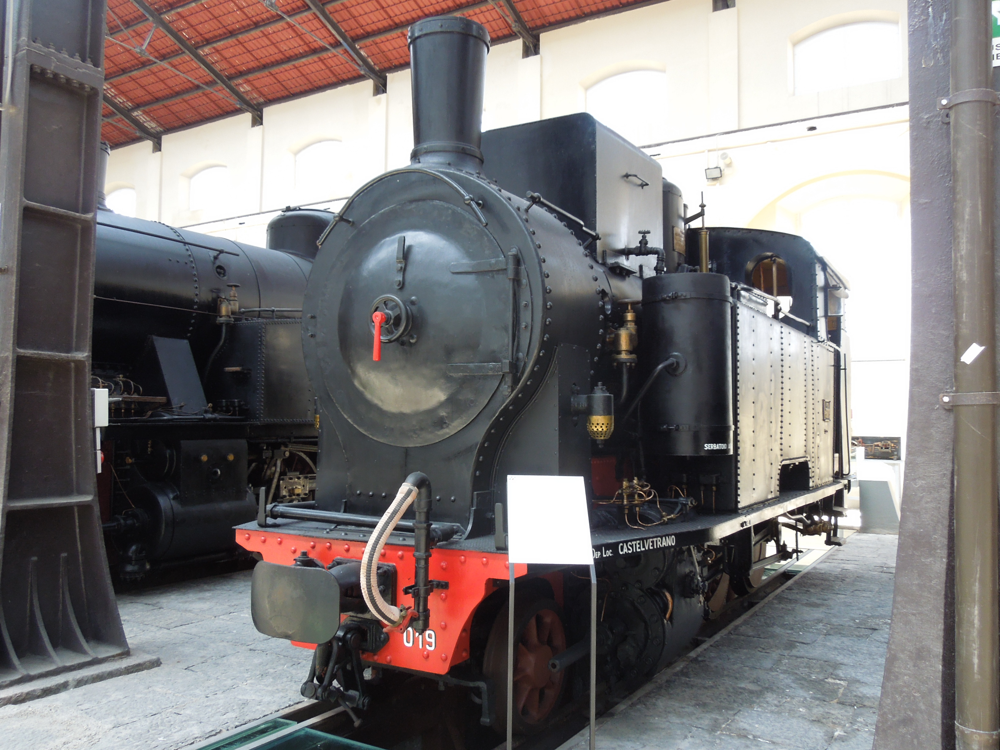 A Pietrarsa vasúttörténeti múzeum